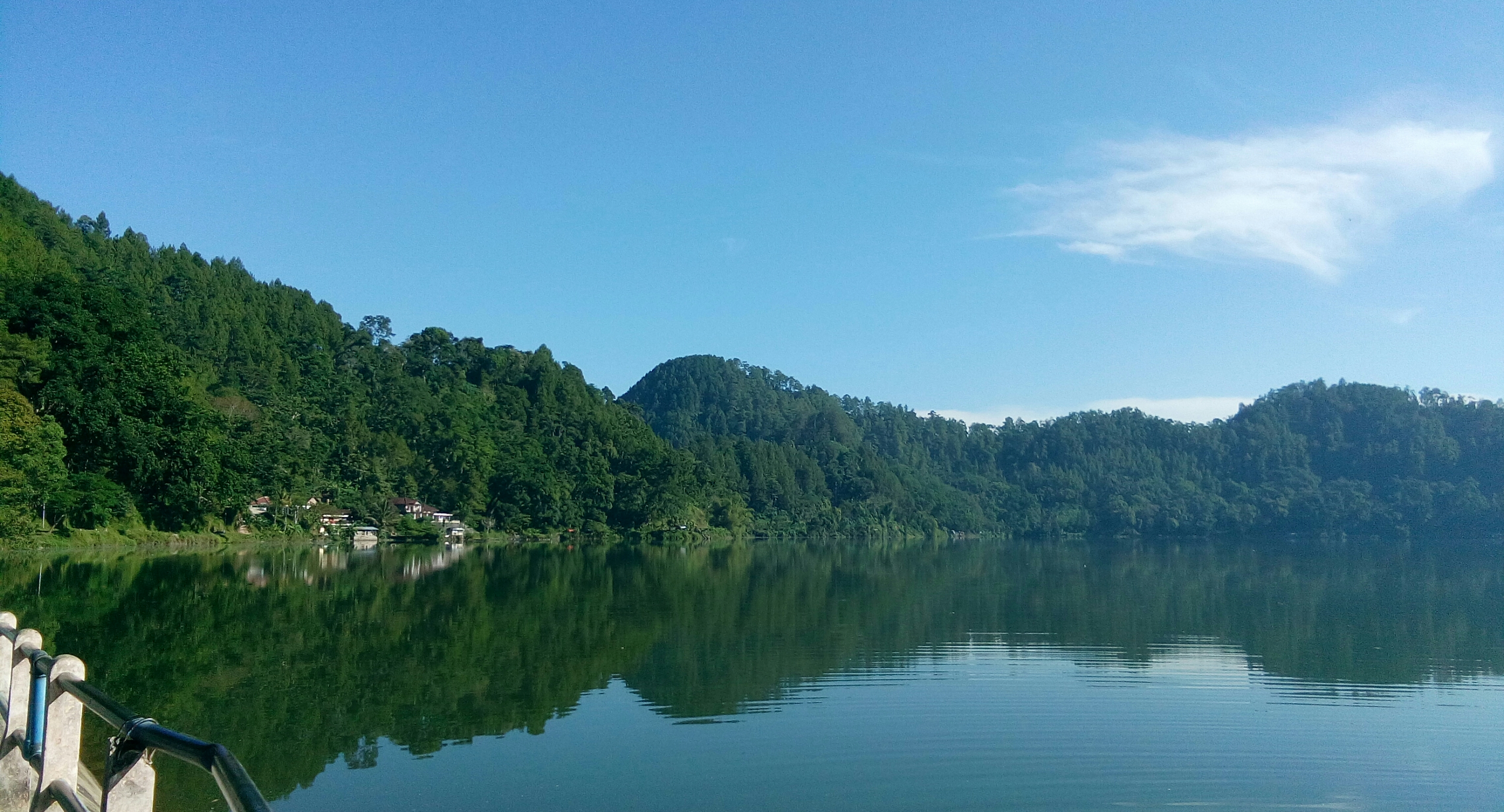 Telaga Ngebel adalah sebuah danau alami terletak di kaki gunung wilis yang berada pada ketinggian 750 mdpl tepatnya di Kecamatan Ngebel, Kabupaten Ponorogo, Provinsi Jawa Timur. Danau ini merupakan tujuan utama wisata di Kabupaten Ponorogo yang ramai dikunjungi oleh wisatawan domestik dari berbagai kota di Indonesia. Rute menuju telaga ini sangatlah mudah dijangkau yaitu 30 Km dari pusat kota Ponorogo. Telaga Ngebel ini mempunyai luas sekitar 5 Km. Kita bisa mengelilinginya dengan menggunakan kuda yang disewakan di area telaga atau montor pribadi. Puncak keramaian di Telaga Ngebel ini yaitu pada tanggal 1 Muharram atau biasa disebut 1 sura. Pada tanggal tersebut diadakan larung sesaji berupa kepala kerbau dilarung menuju tengah telaga. 4 kaki kerbau yang sudah disembelih ditanam di empat arah mata angin sekitar telaga. Sesajian itu bertujuan untuk memohon keselamtana kepada sang Maha Esa.